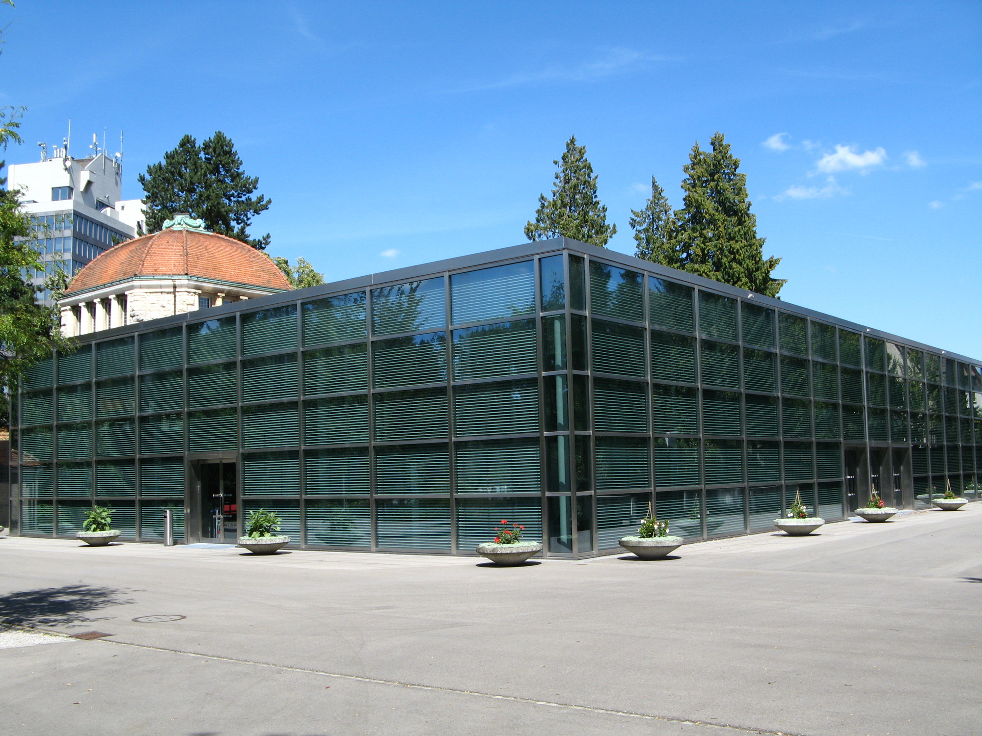 Abdankungshalle im Krematorium Aarau